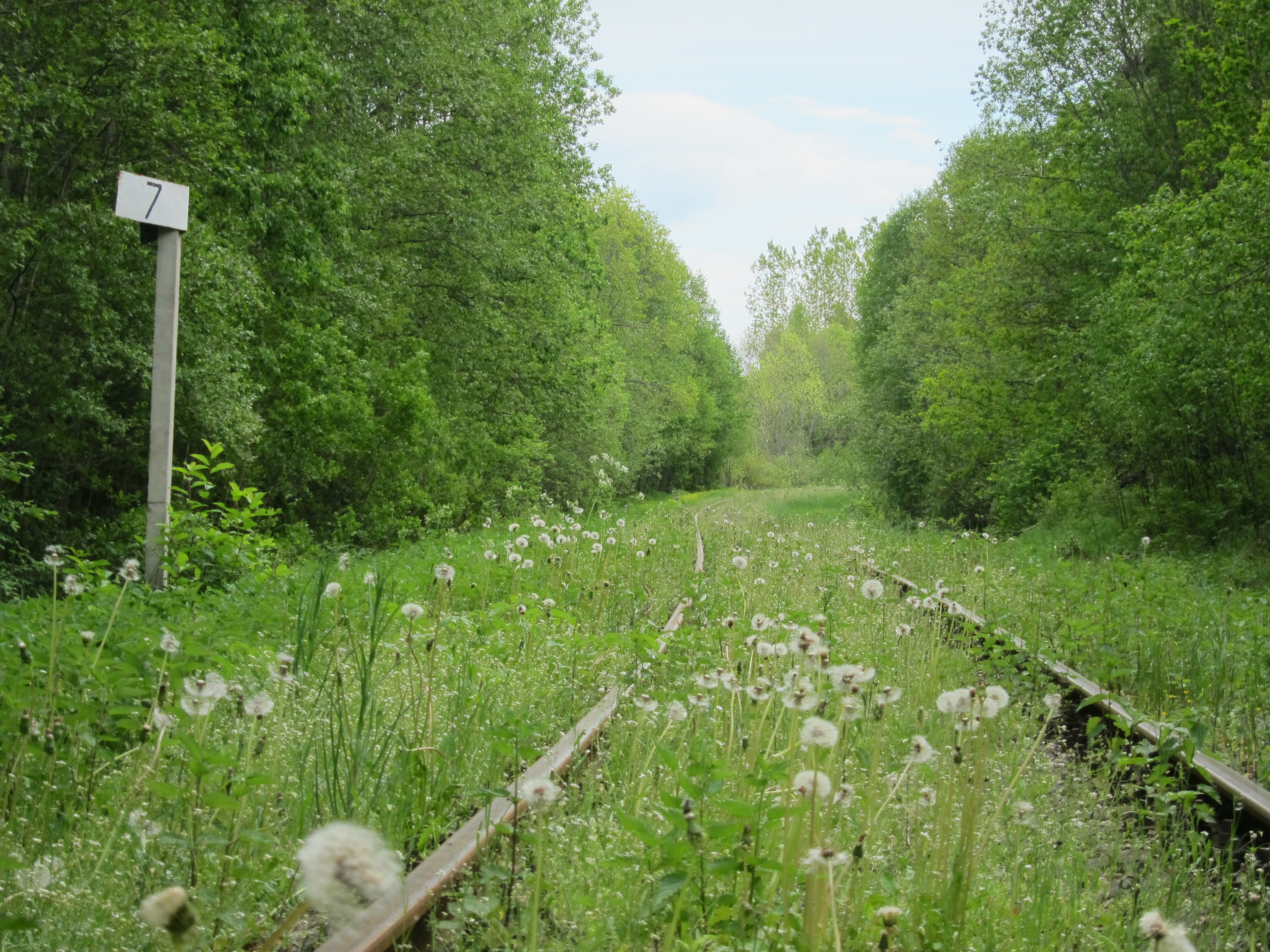 Dzelzceļa līnijas Jaunkalsnava—Veseta 7. kilometrs.